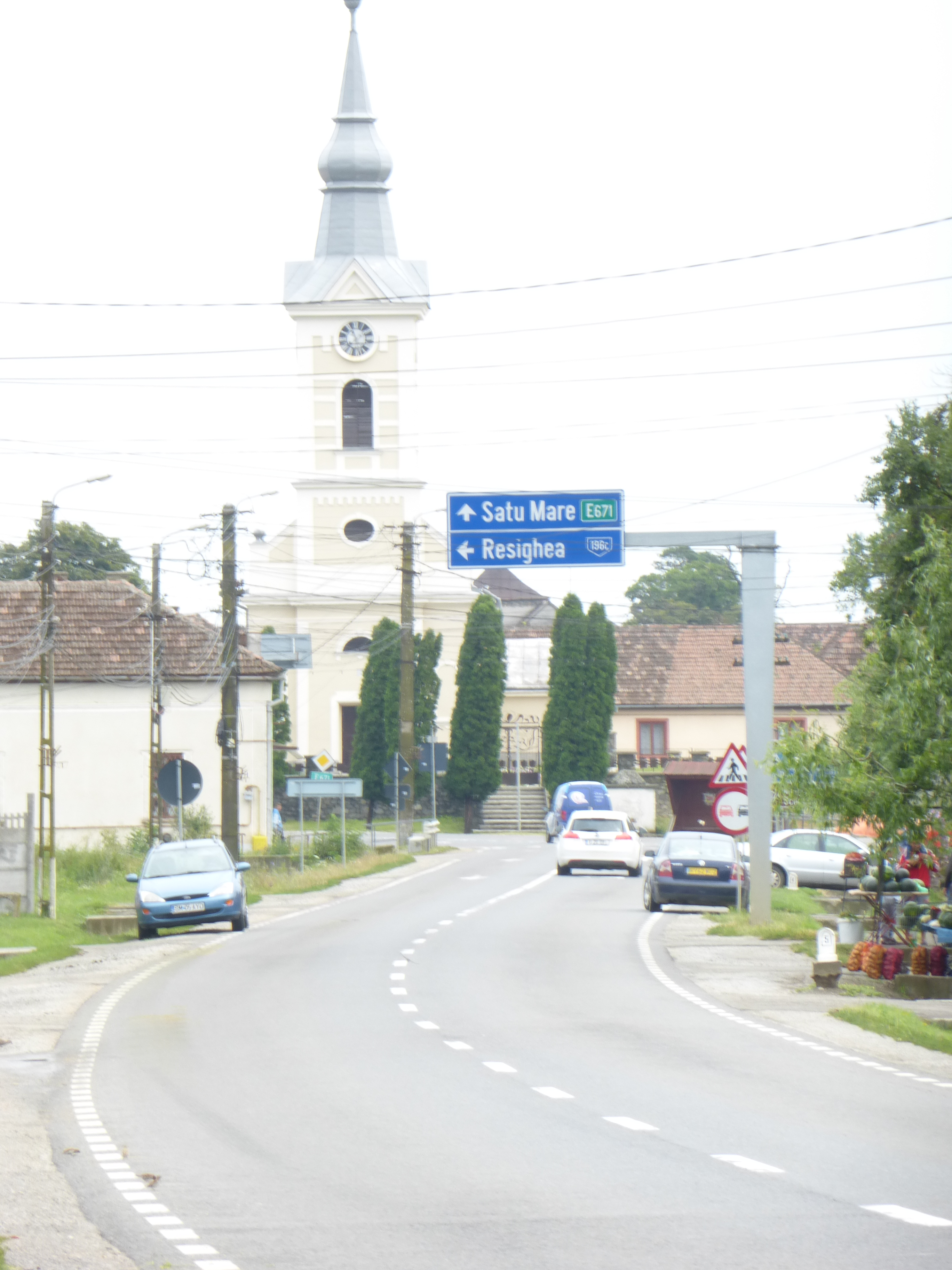 Hauptstraße von Ciumesti mit Kirche